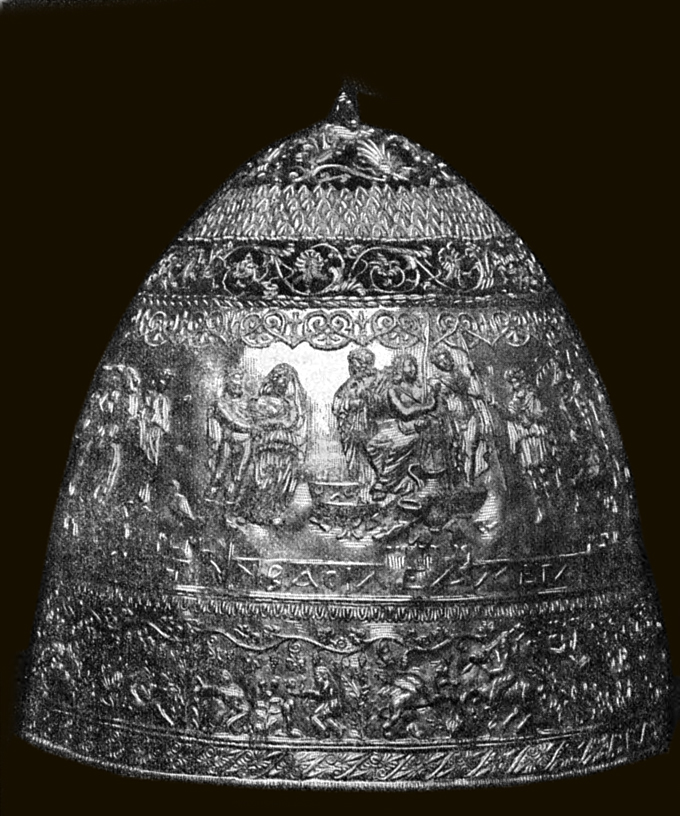 Photo de la tiare de Saïtapharnès.